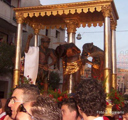 S.S Cristo alla colonna di Ispica, venerato il Giovedì Santo nella basilica di Santa Maria Maggiore